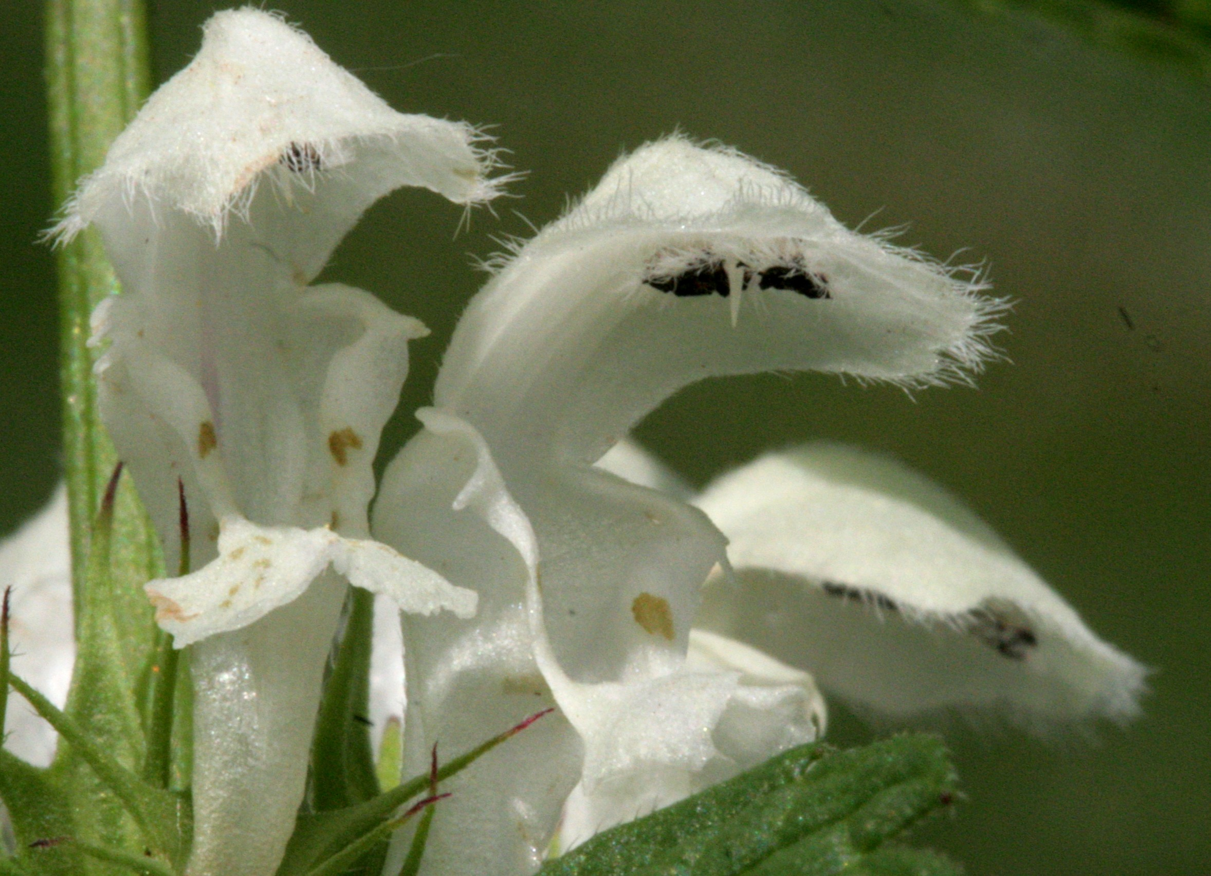 Falsa ortica bianca - Località : Cesa, Limana (BL), 330 m s.l.m.